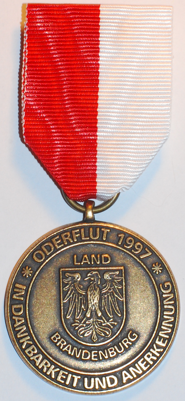 Oderflut-Medalie